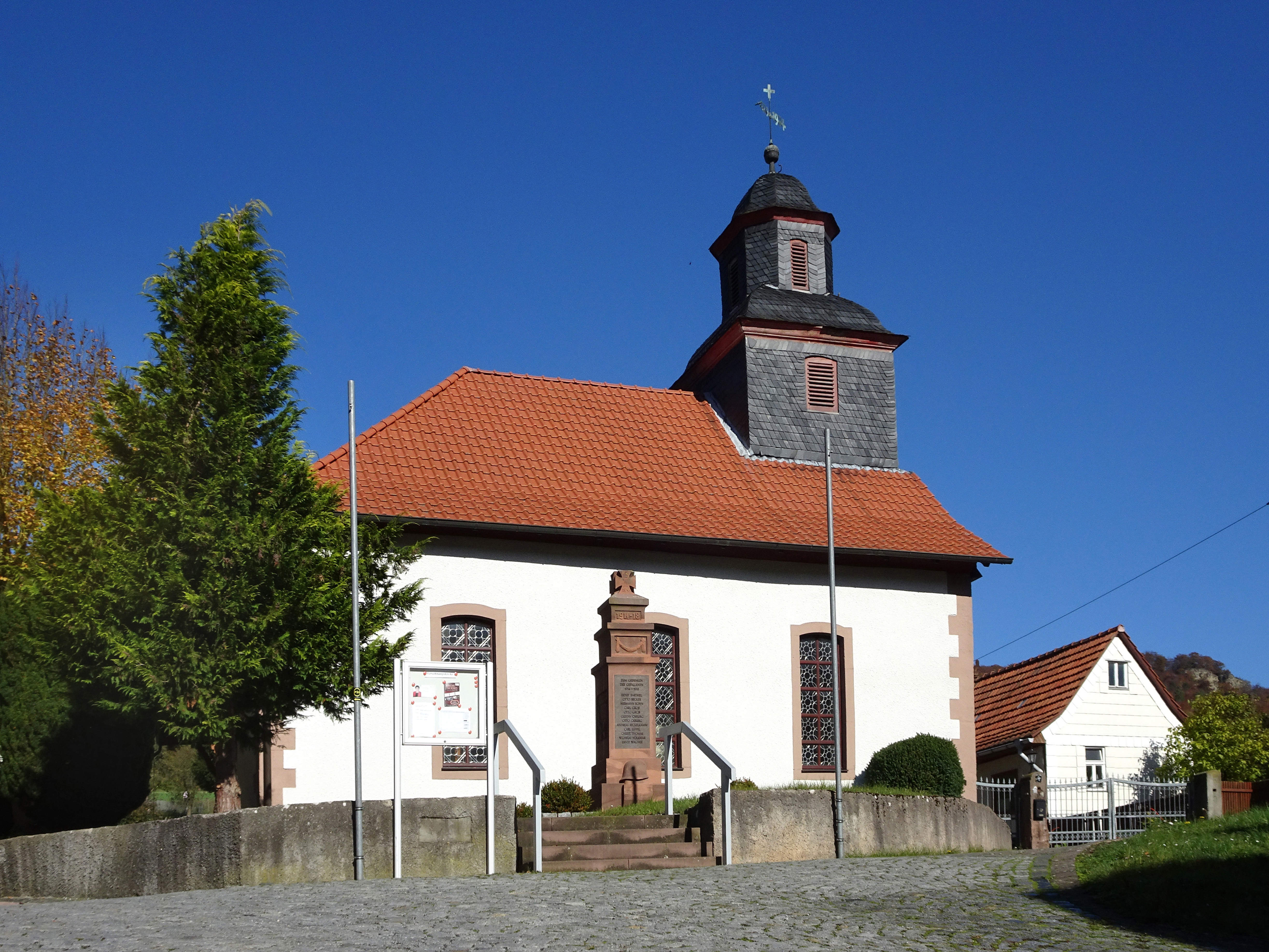 Versöhnungskirche Asbach. Die Dorfkirche von Asbach wurde gegen Ende des 18. Jahrhunderts auf der Stelle des zuvor abgebrochenen Vorgängerbaus errichtet. Nach umfangreicher Renovierung wurde sie im Jahr 1978 neu geweiht und trägt seither den Namen Versöhnungskirche. Asbach, seit 1950 nach dem Zusammenschluss mit Sickenberg, Asbach-Sickenberg ist eine Gemeinde in der Verwaltungsgemeinschaft Uder im thüringischen Landkreis Eichsfeld.